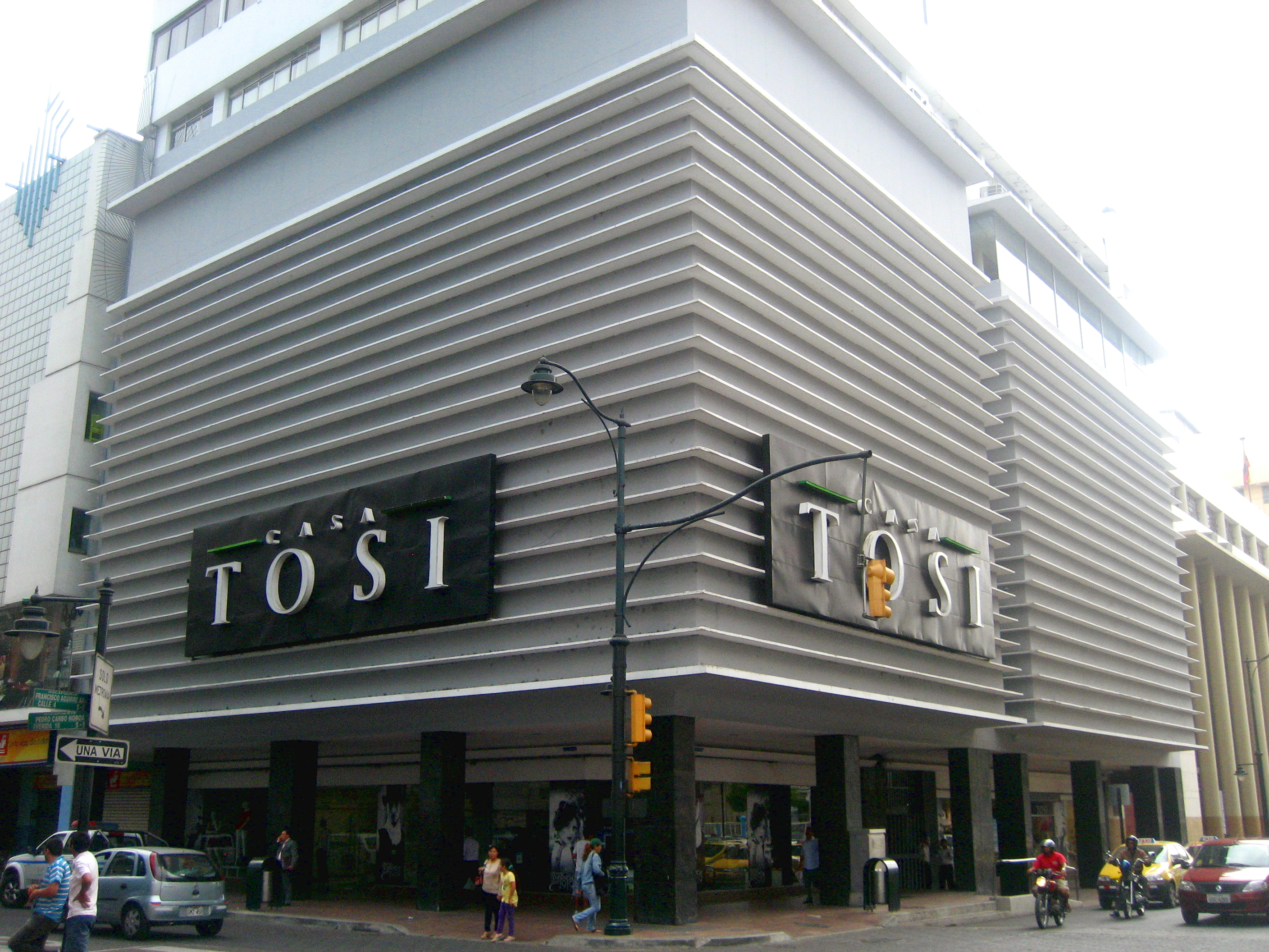 Matriz de Casa Tosi en Guayaquil